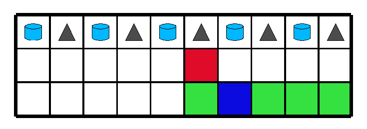 Posición de partida del juego Senet